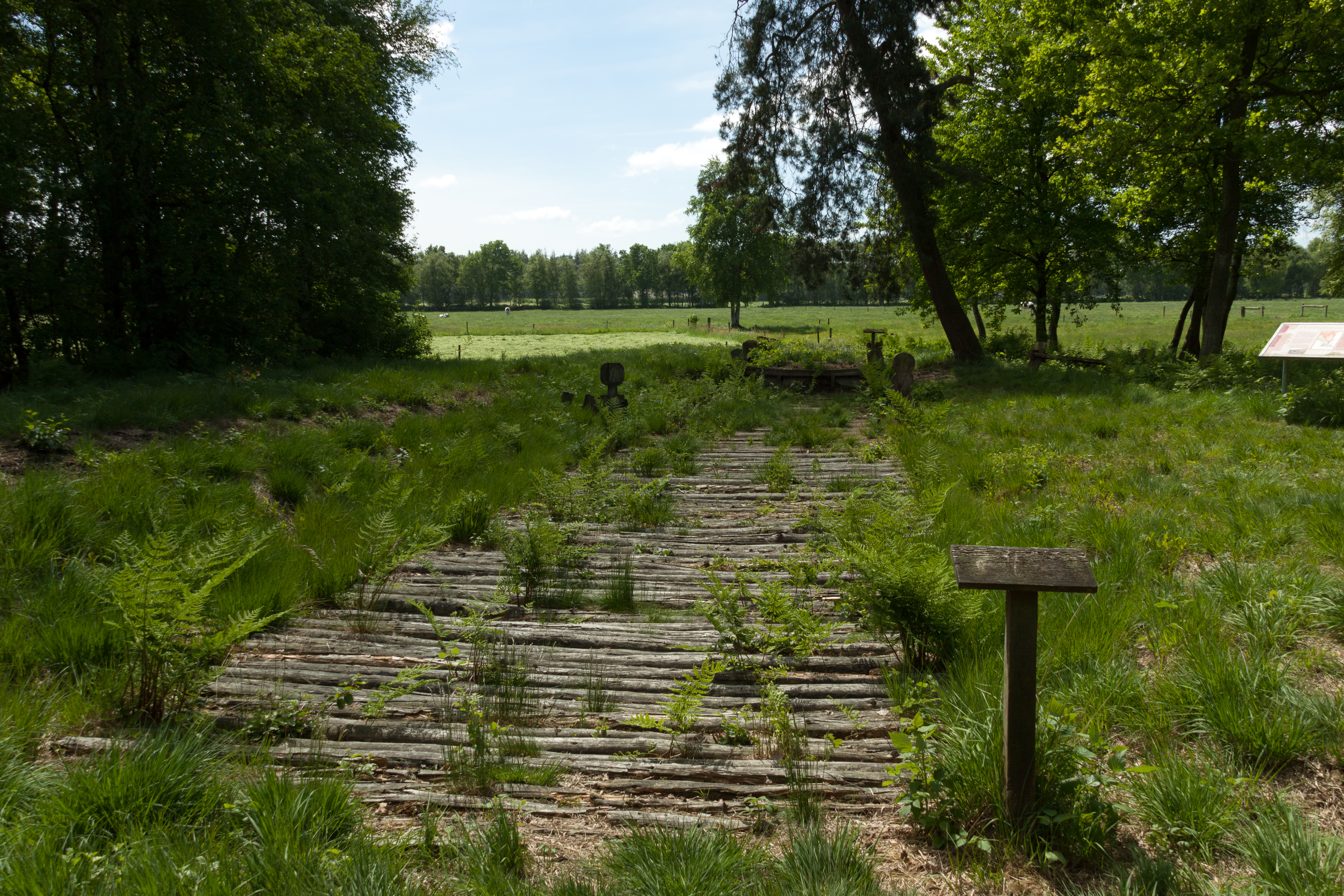 Bohlenweg im Wittemoor